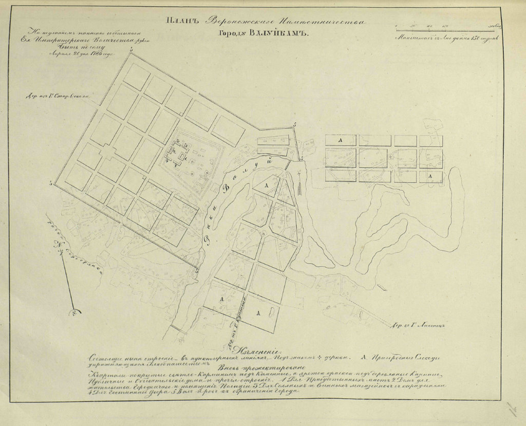 План Воронежского наместничества городу Валуйкам, утвержденный в 1786 году.